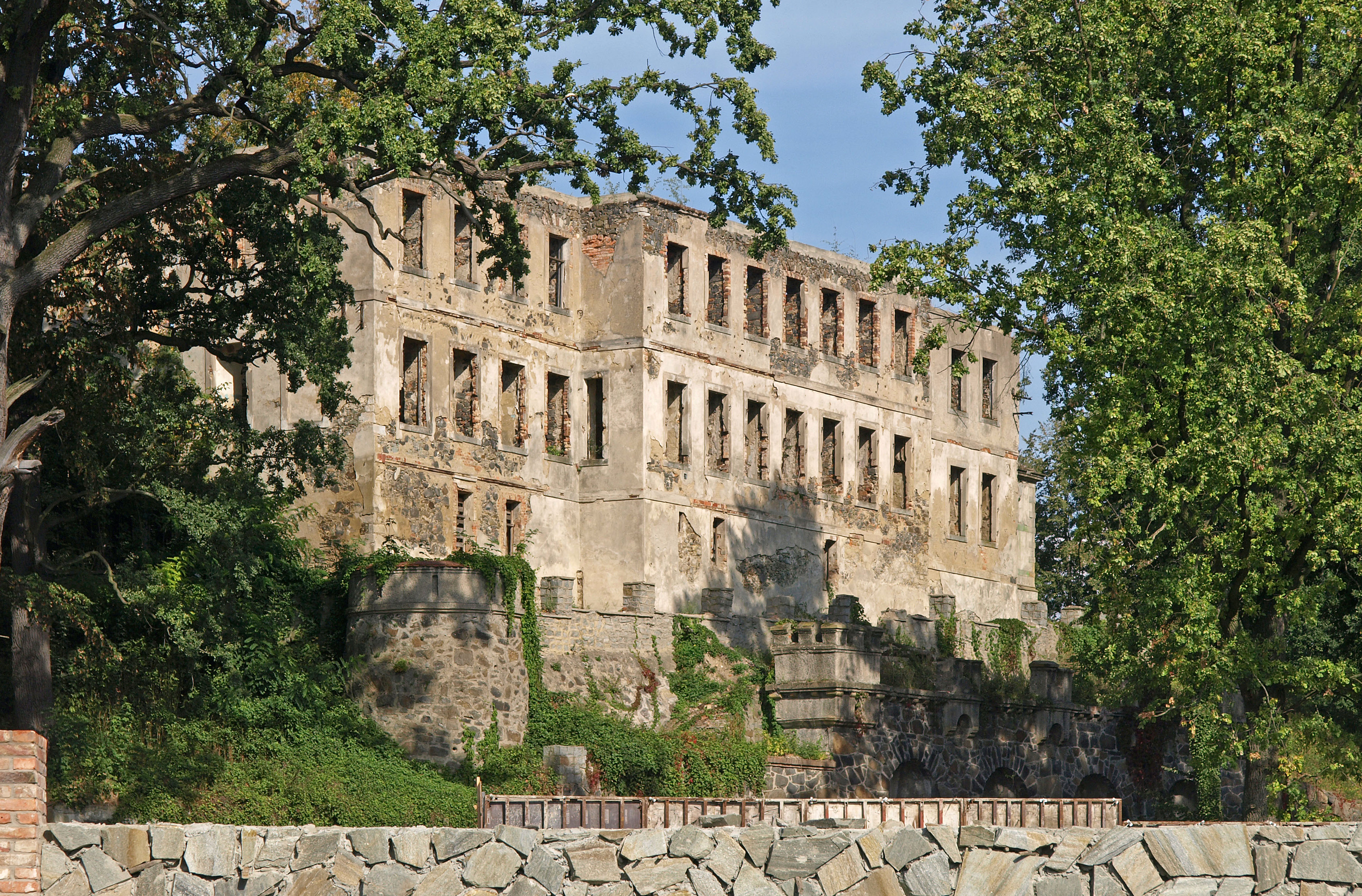 Ruine des Schlosses Heidersdorf (Włosień)